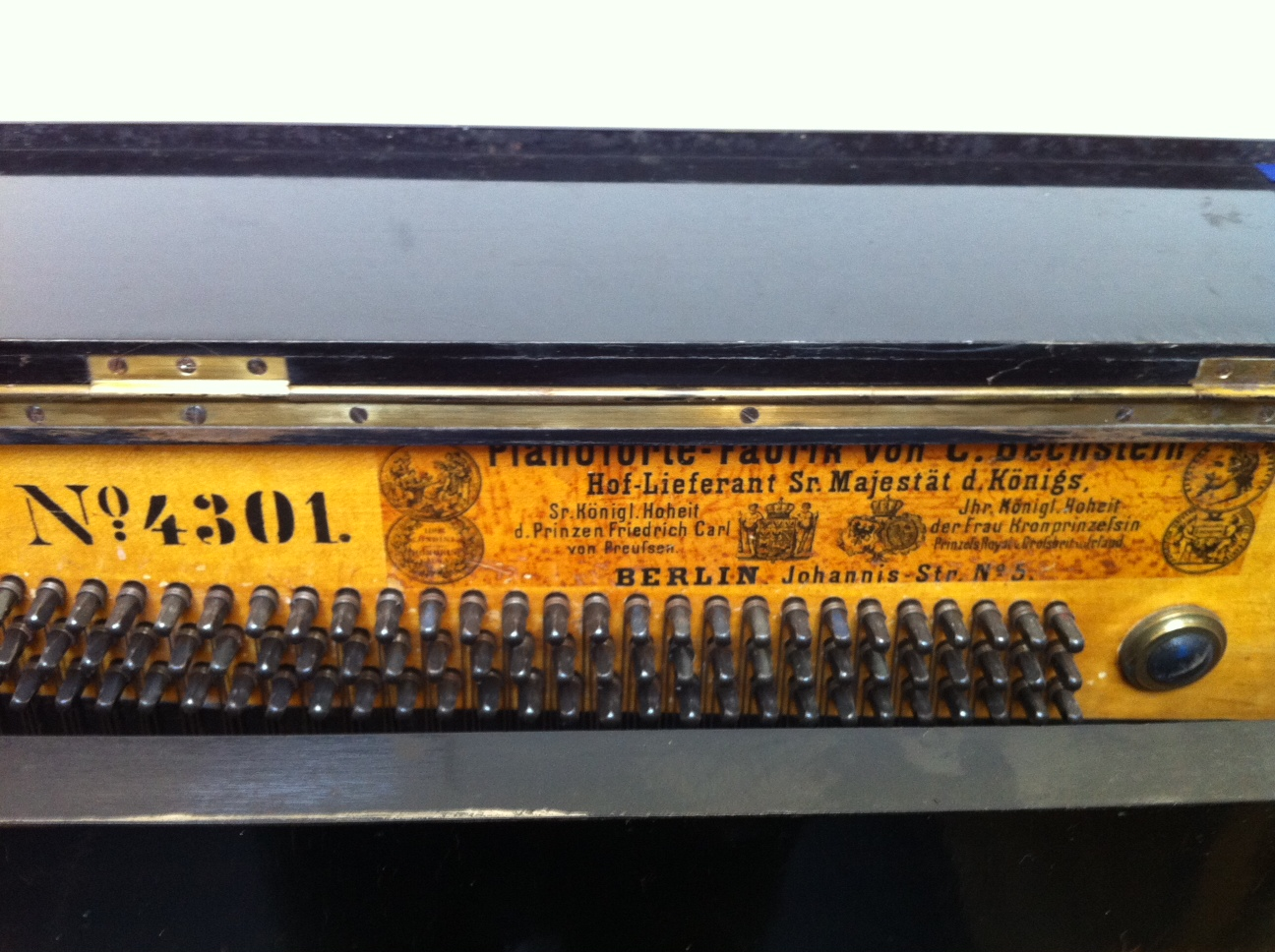 Seriennummer eines alten Bechstein Pianos aus dem Jahr 1870